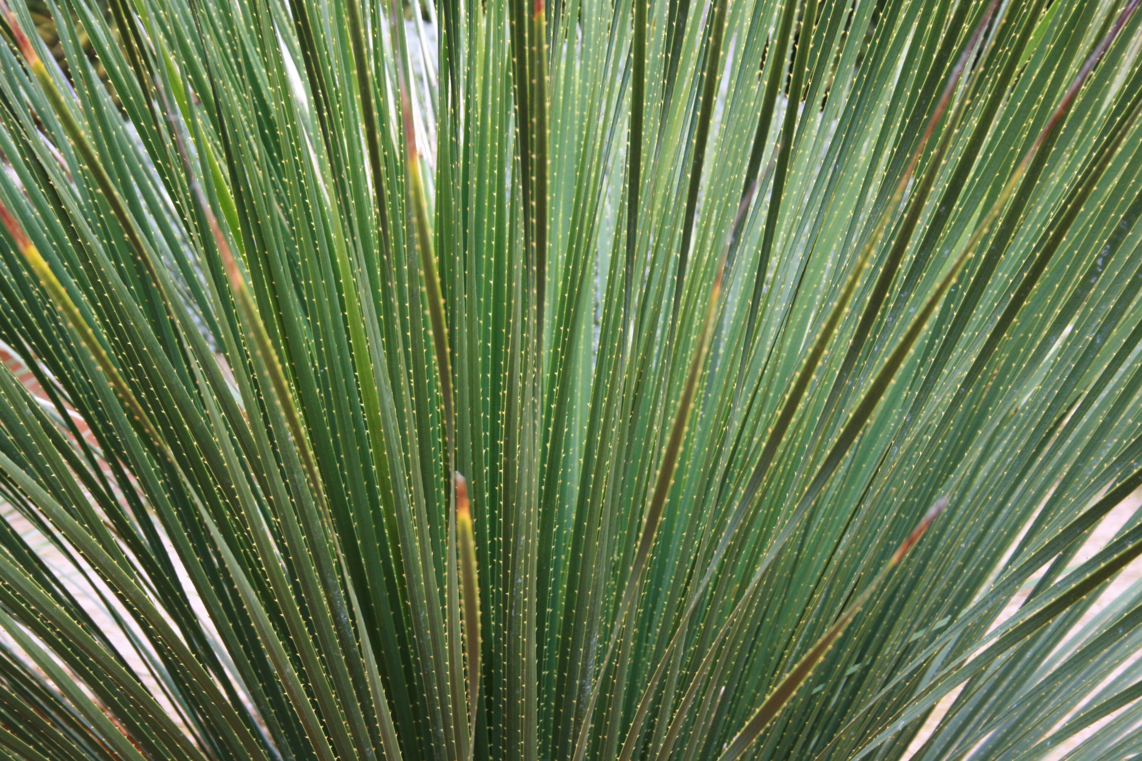 Botanicactus in Ses Salines, Mallorca, Spain